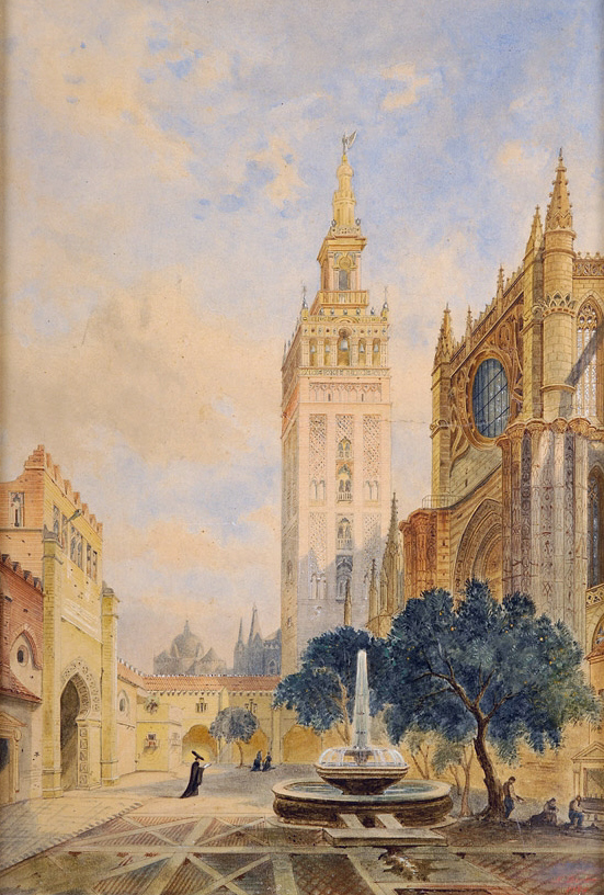 Ansicht der Kathedrale von Sevilla. Aquarell. 53 x 37 cm. Undeutlich signiert. Datiert 1884.